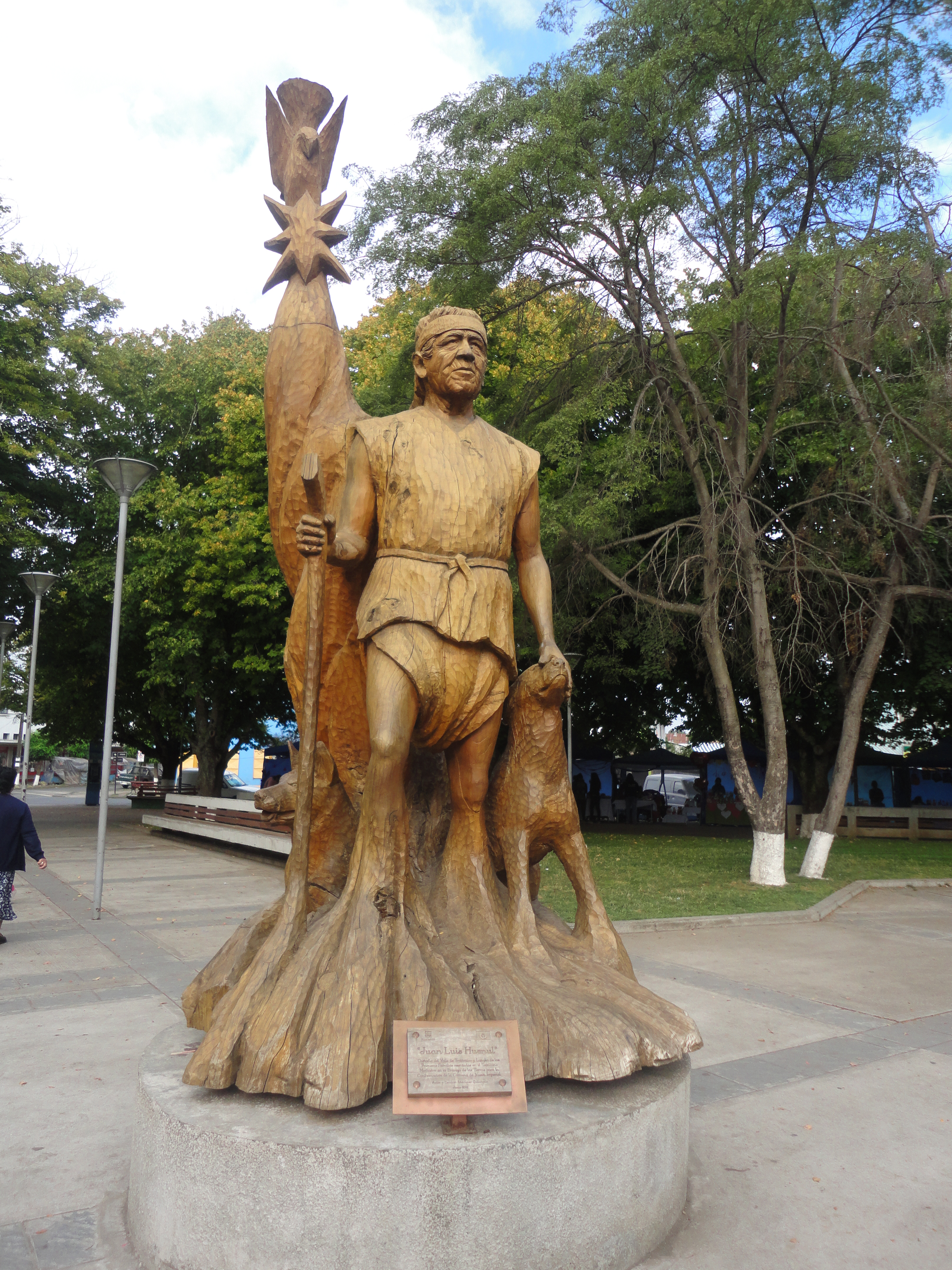 Juan Luis Huenul. Custodio del Valle de Traitraico y Longko de las Primeras Familias asentadas en el Territorio. Mediador en la Entrega de las Tierras para la Conformación de la Comuna de Nueva Imperial Autor y Escultor: Ildefonso Quilempan Junio 2012